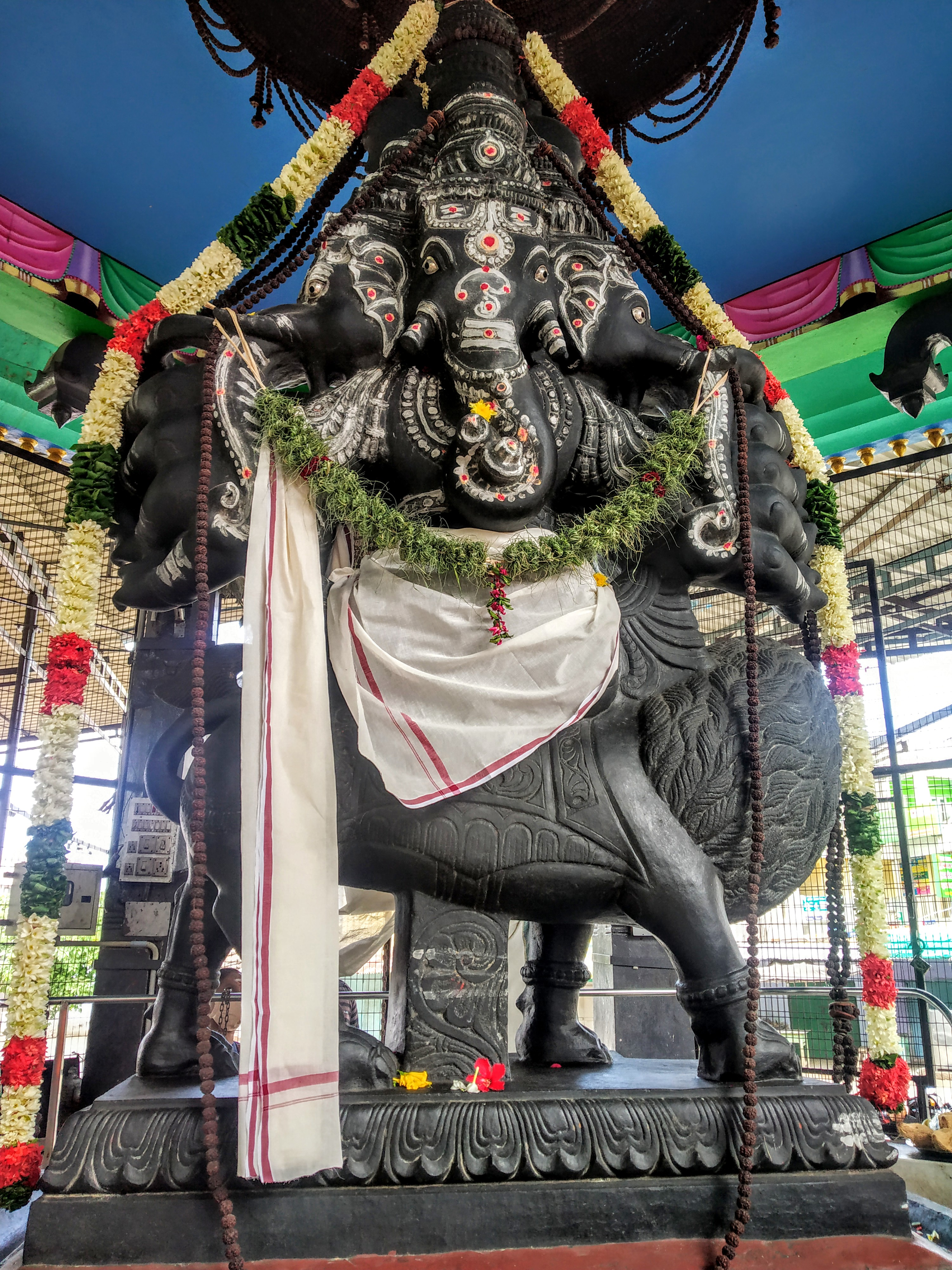 பரமத்தி வேலூர் பஞ்சமுக விநாயகர் சிலை